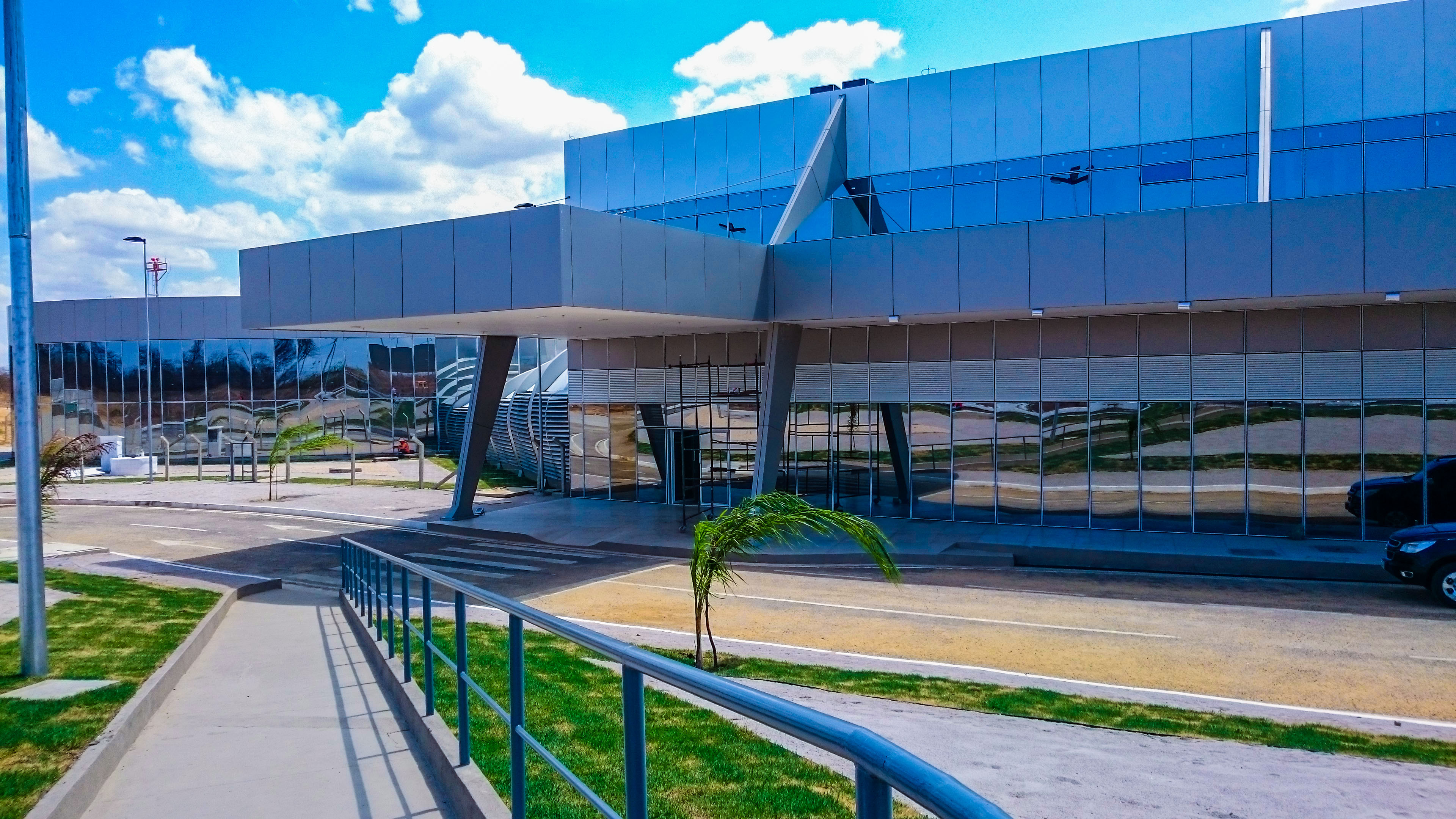 Fachada Aeroporto Serra da Capivara